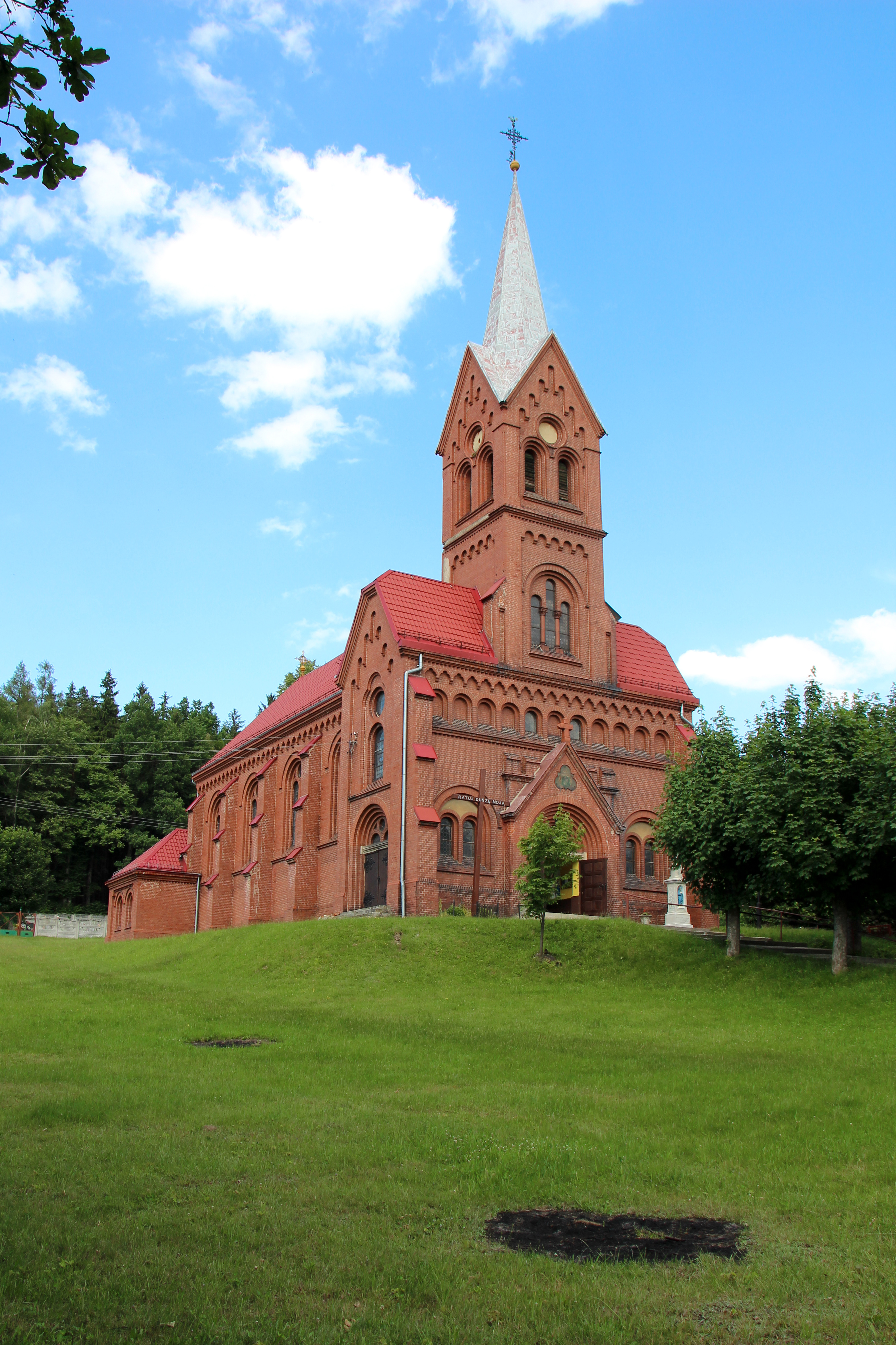 Podlesie - rzymskokatolicki kościół p.w. św. Jerzego